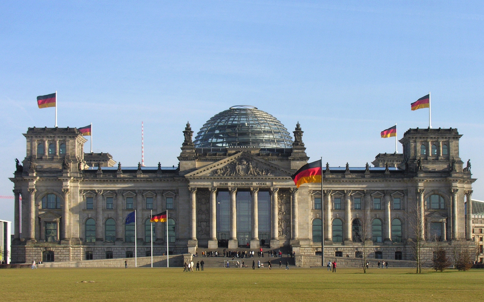 Das Reichstagsgebäude als Plenarsaal-Gebäude für den Deutschen Bundestag am Platz der Republik in Berlin - Foto 2009 Wolfgang Pehlemann Steinberg DSCN9832